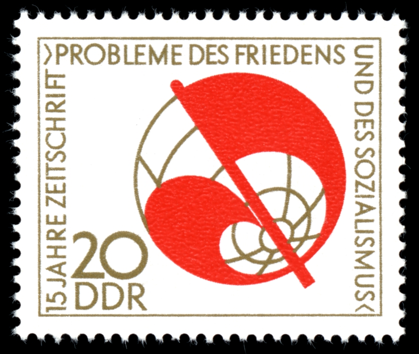 Information: 15 Jahre Zeitschrift „Probleme des Friedens und des Sozialismus“: Stilisierte Erdkugel, Rote Fahne Ausgabepreis: 20 Pfennig First Day of Issue / Erstausgabetag: 11. September 1973 Auflage: 6.000.000 Entwurf: Joachim Rieß Druckverfahren: Rastertiefdruck Michel-Katalog-Nr: Ländercode-MiNr: 1877